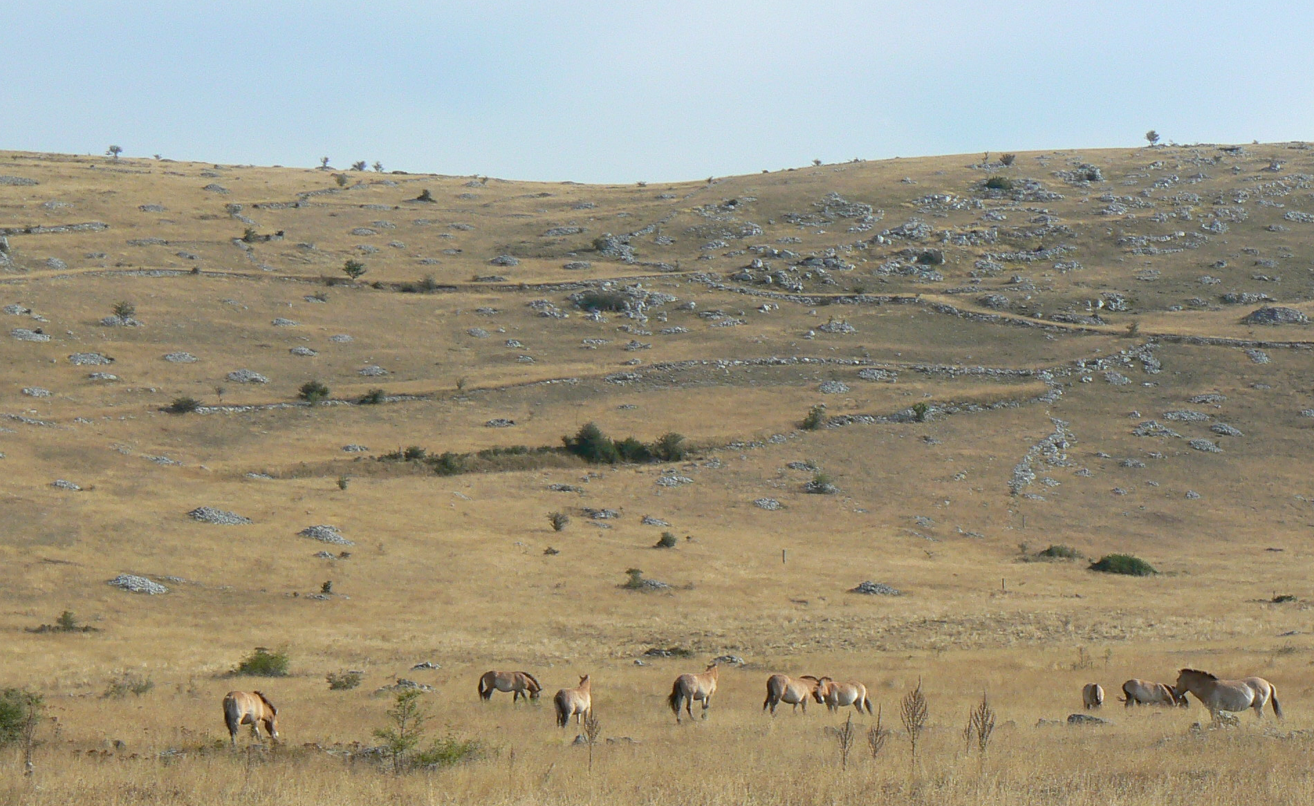 Chevaux de Przewalski sur le Causse Méjan. Simple cadrage du fichier (France Lozère Causse Méjean Chevaux de Przewalski 8.jpg) posté par @Ancalagon.